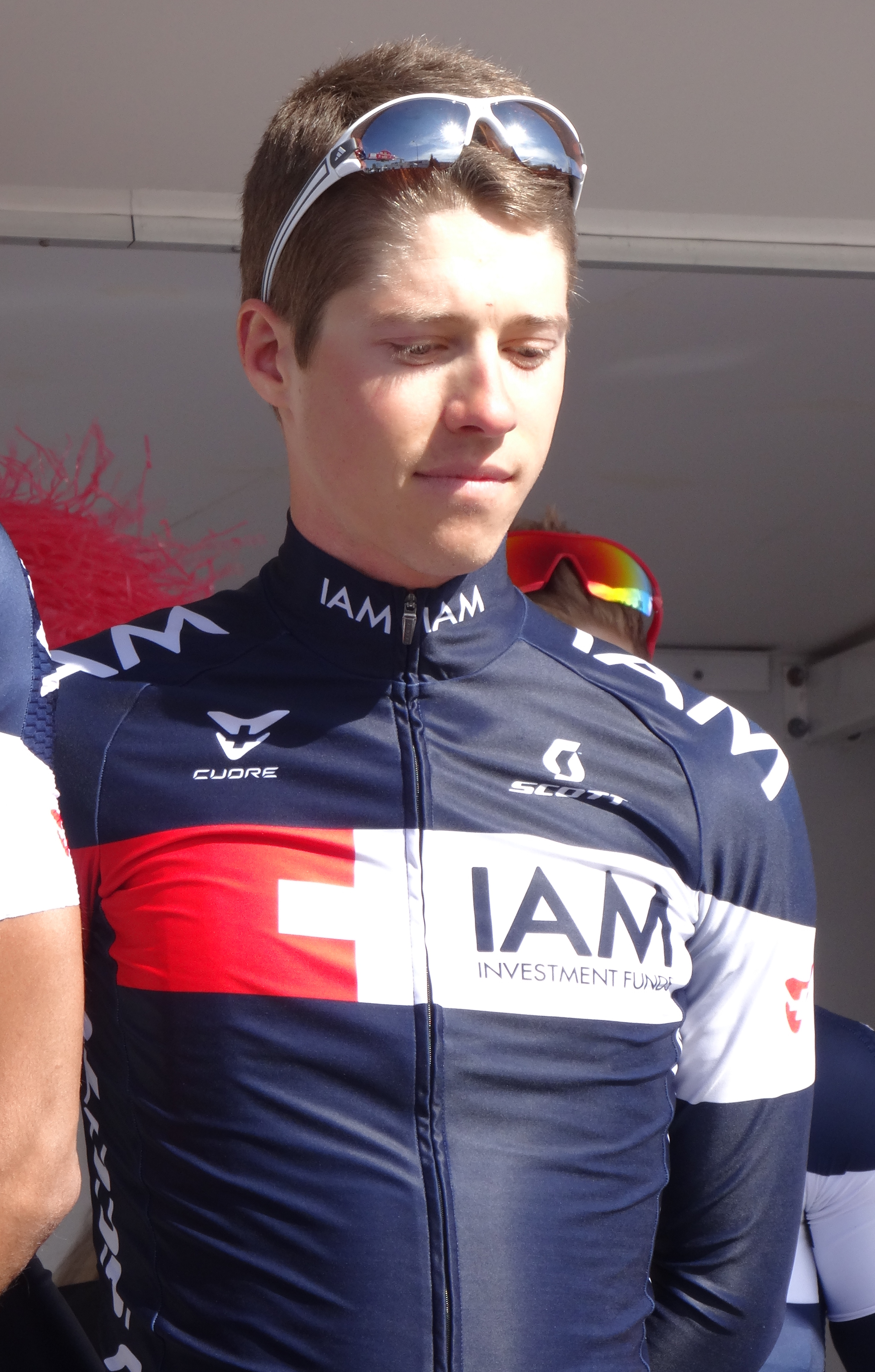 Reportage réalisé le jeudi 17 avril à l'occasion du départ et de l'arrivée du Grand Prix de Denain 2014 à Denain, Nord, Nord-Pas-de-Calais, France.